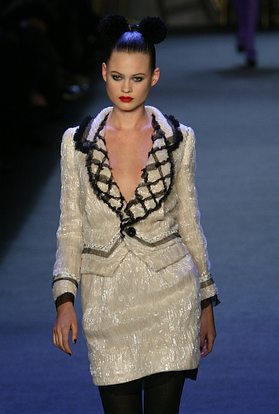 Behati Prinsloo in Zac Posen